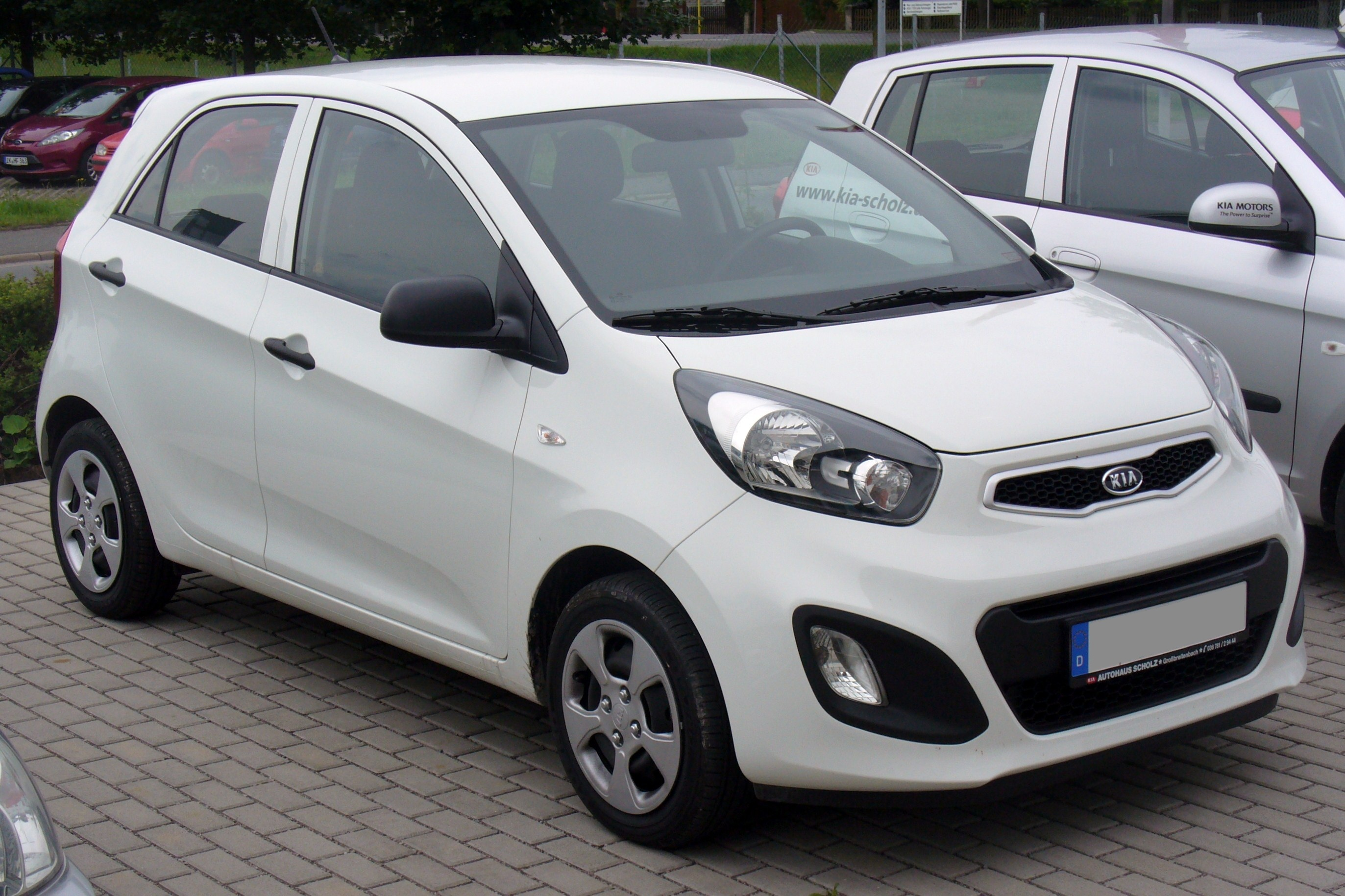 Kia Picanto